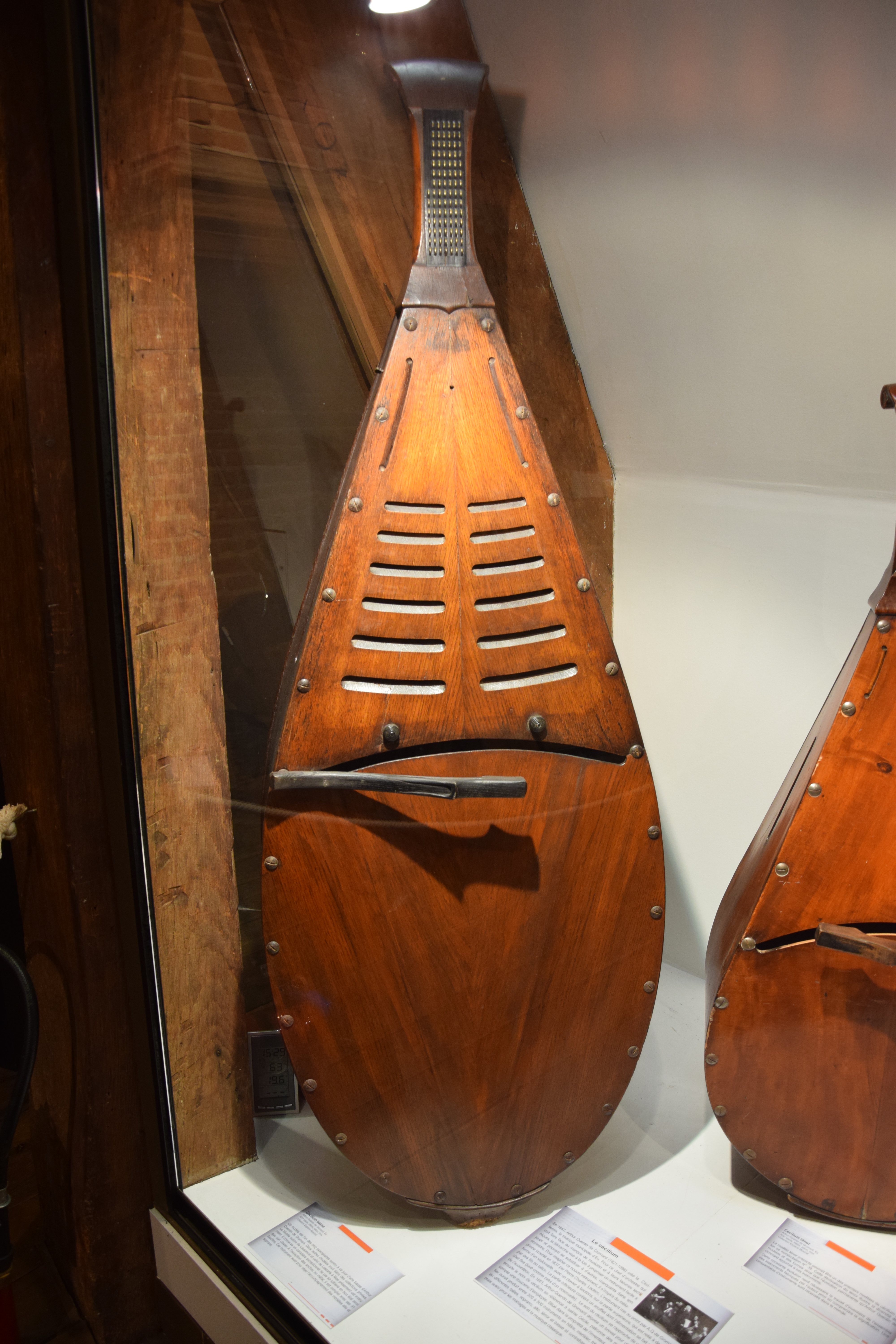 Château de Martainville